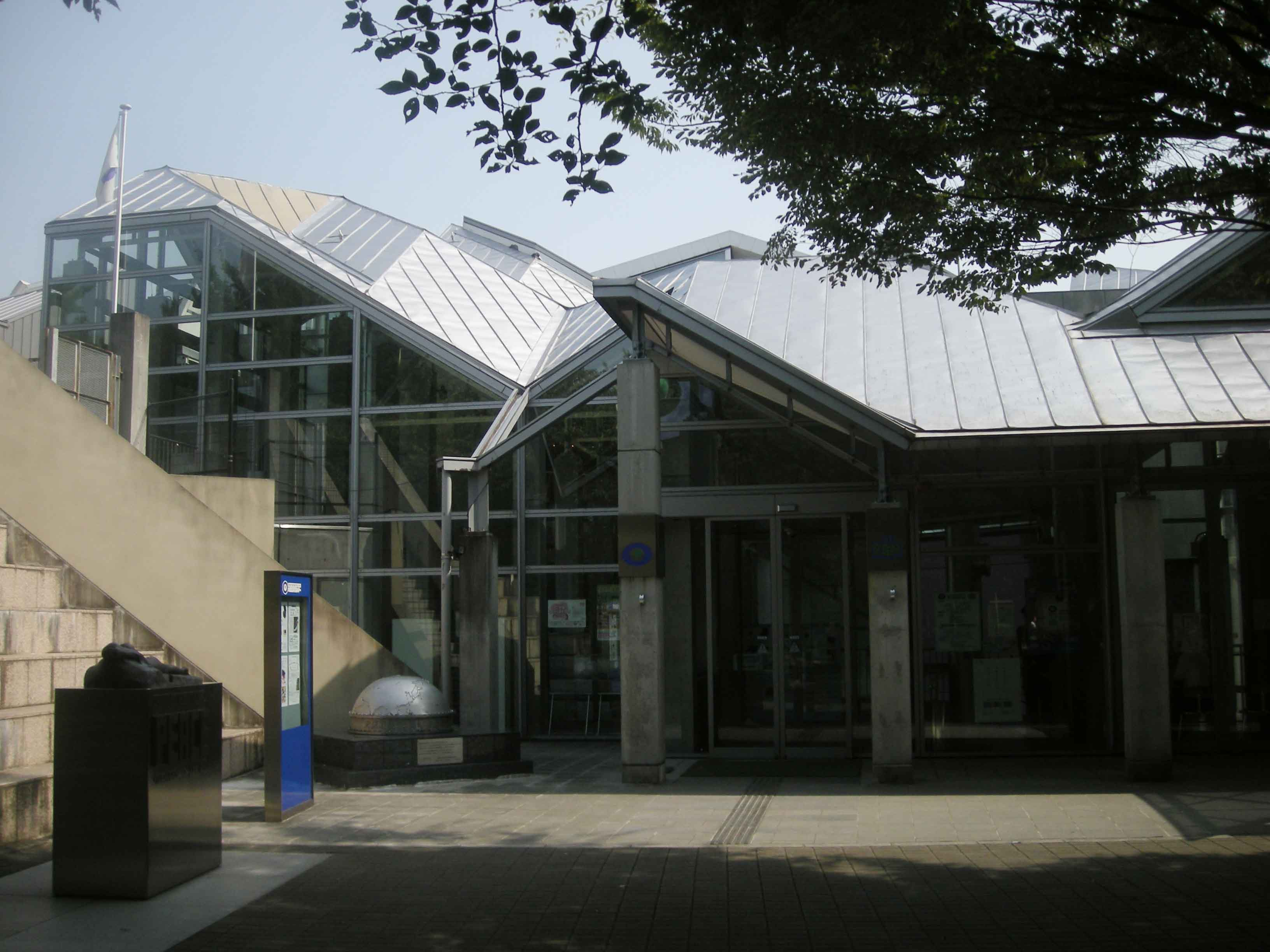 ピースおおさか大阪国際平和センター